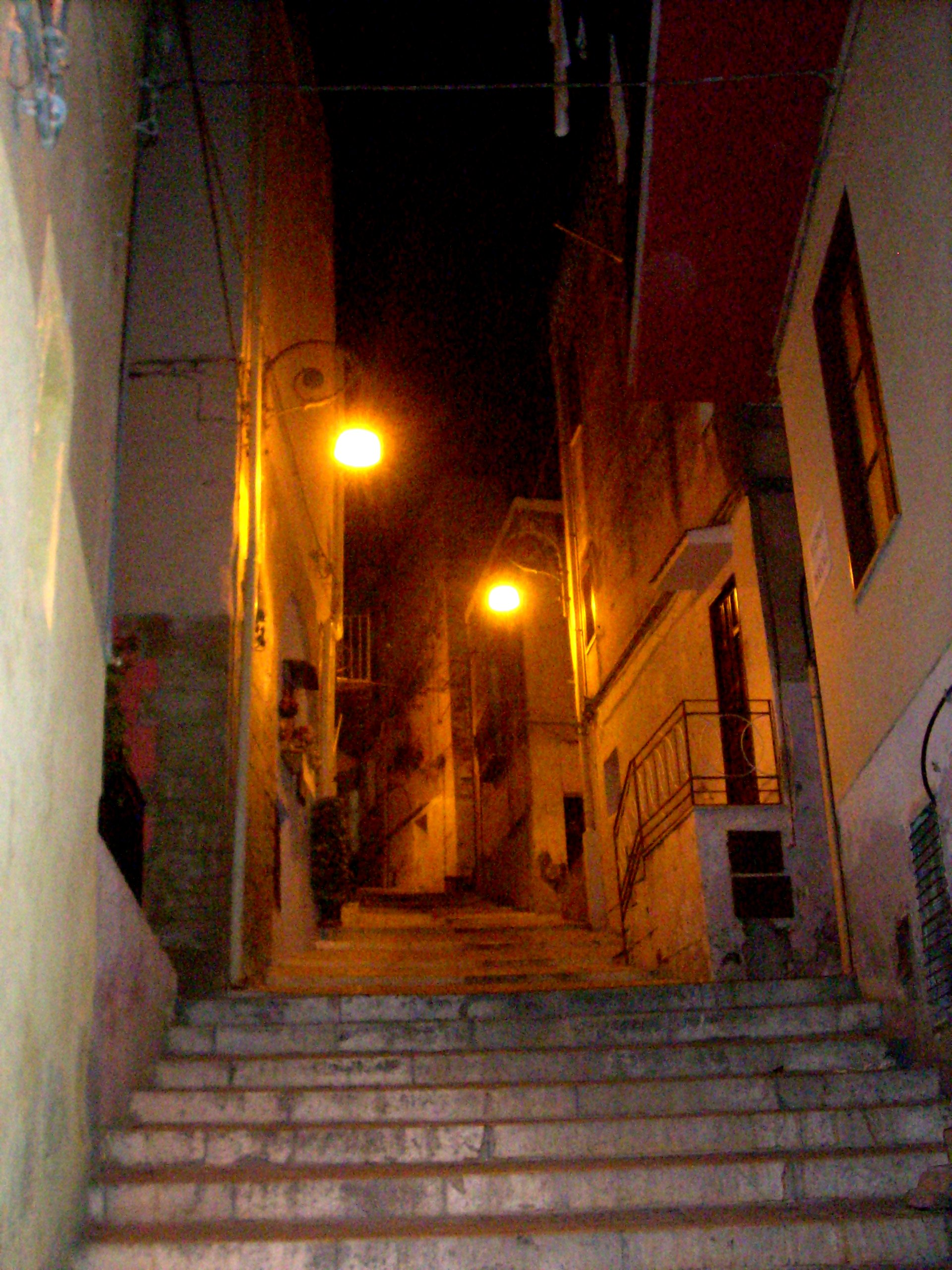 Sciacca: Vicolo notturno